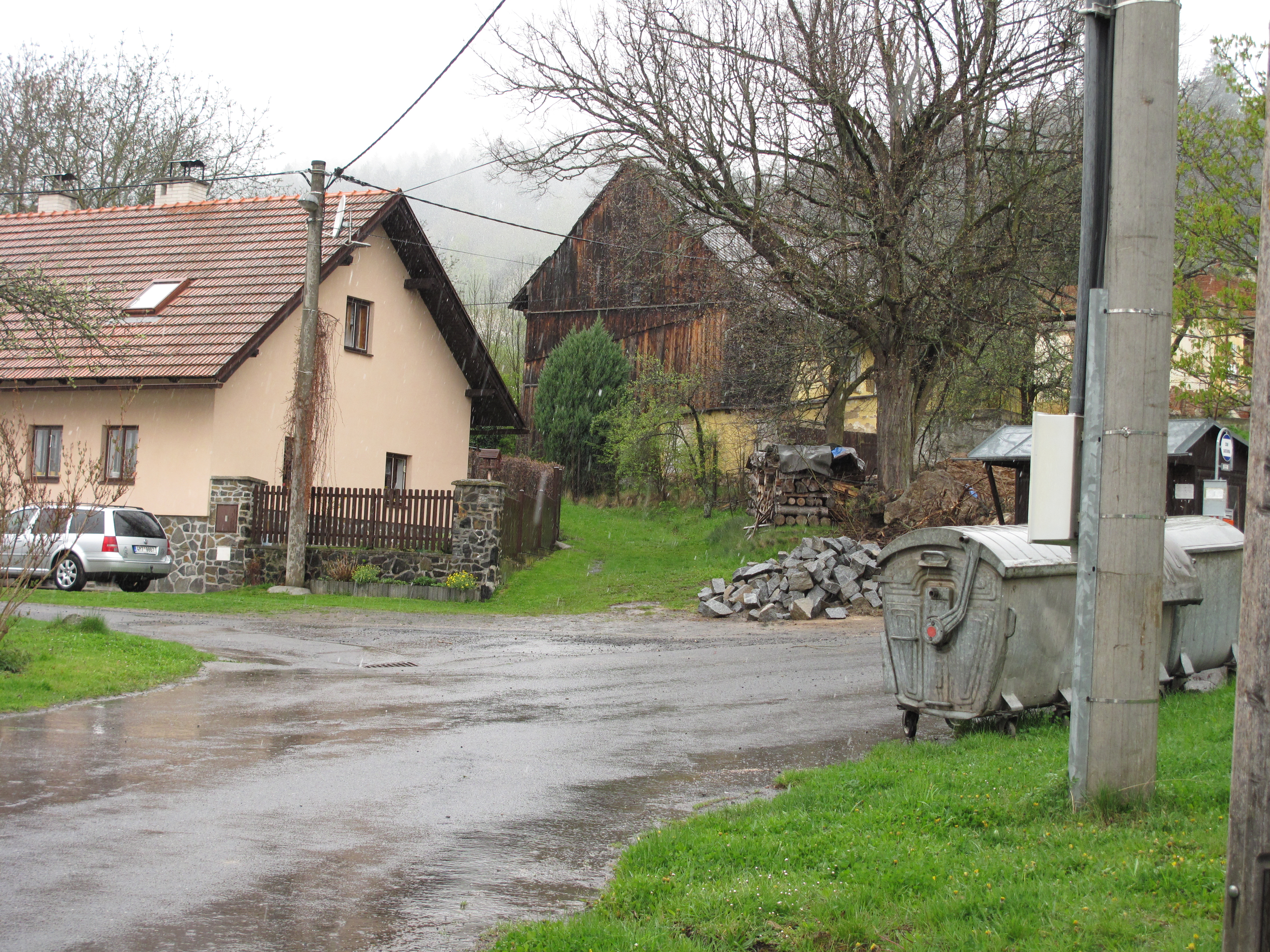 Zahorčice (Strážov). Okres Klatovy, Česká republika.